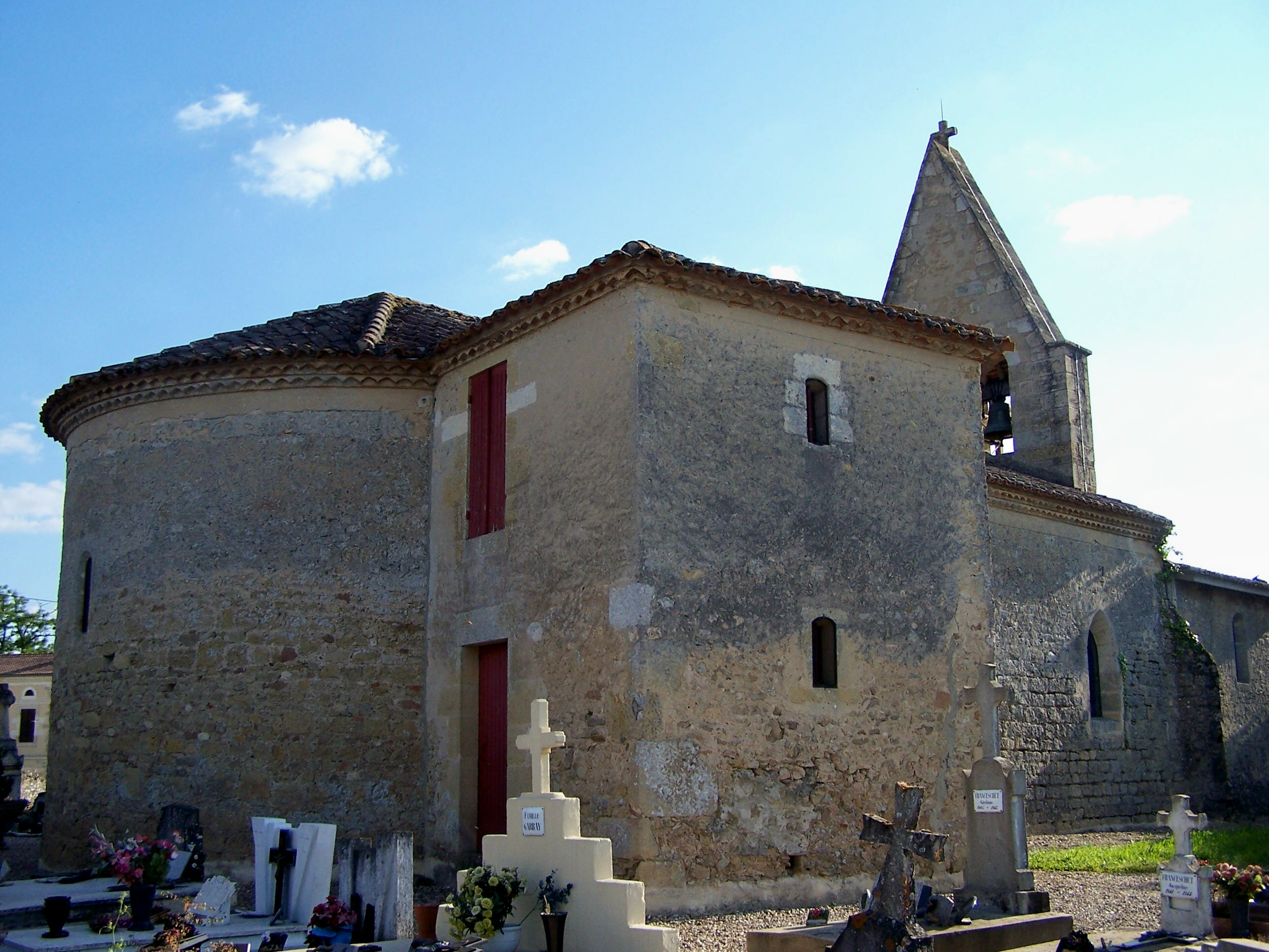 Église de Bassanne, Gironde, France